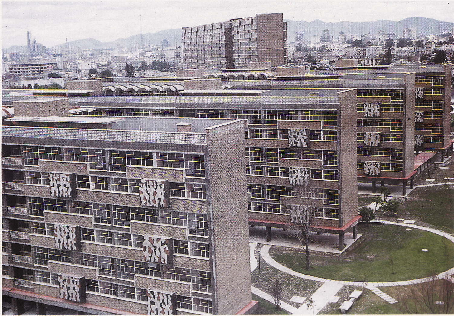 Vista General Del Centro Urbano Presidente Juárez